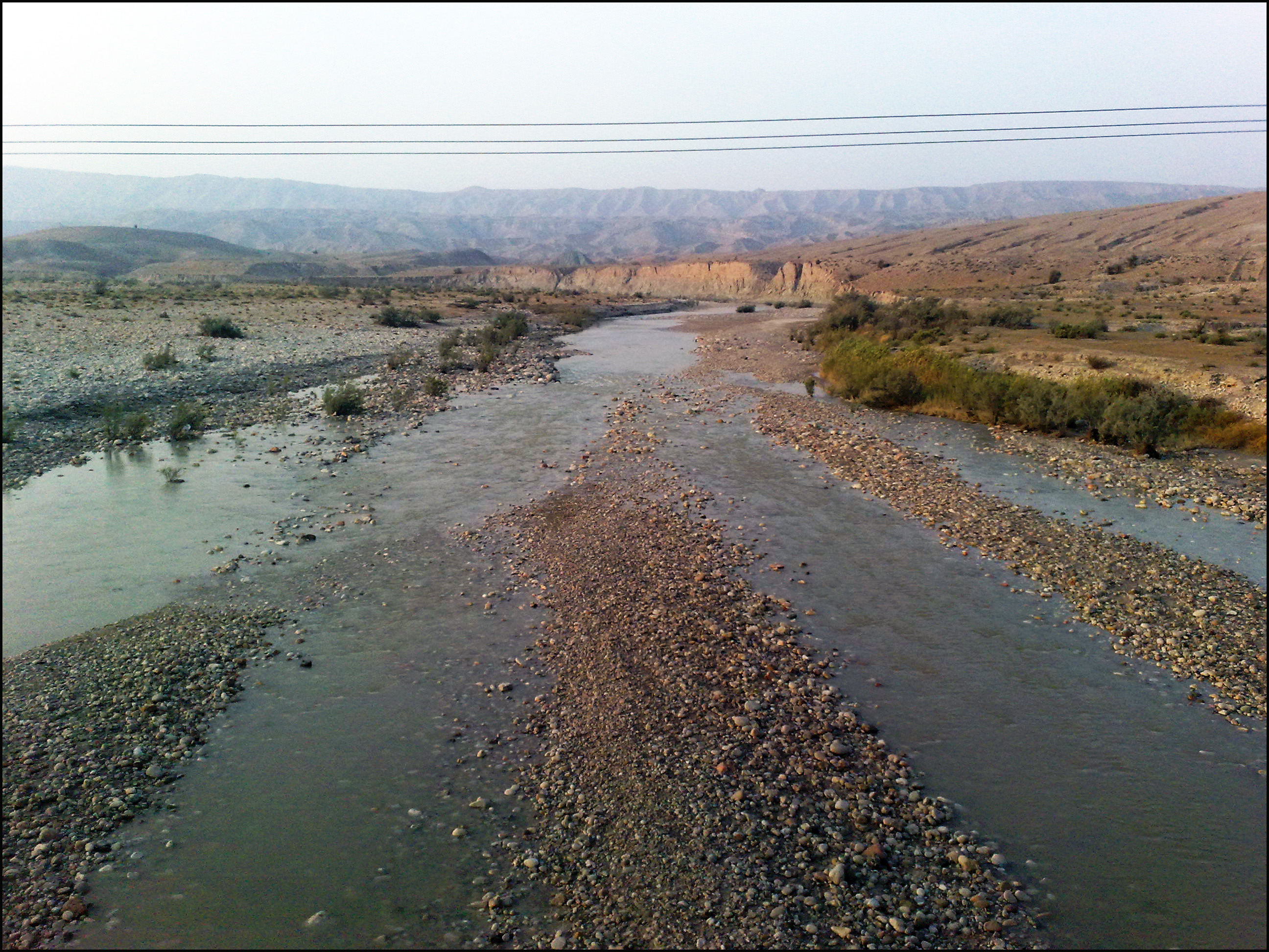 Shoor River, Koordeh رود شور کورده